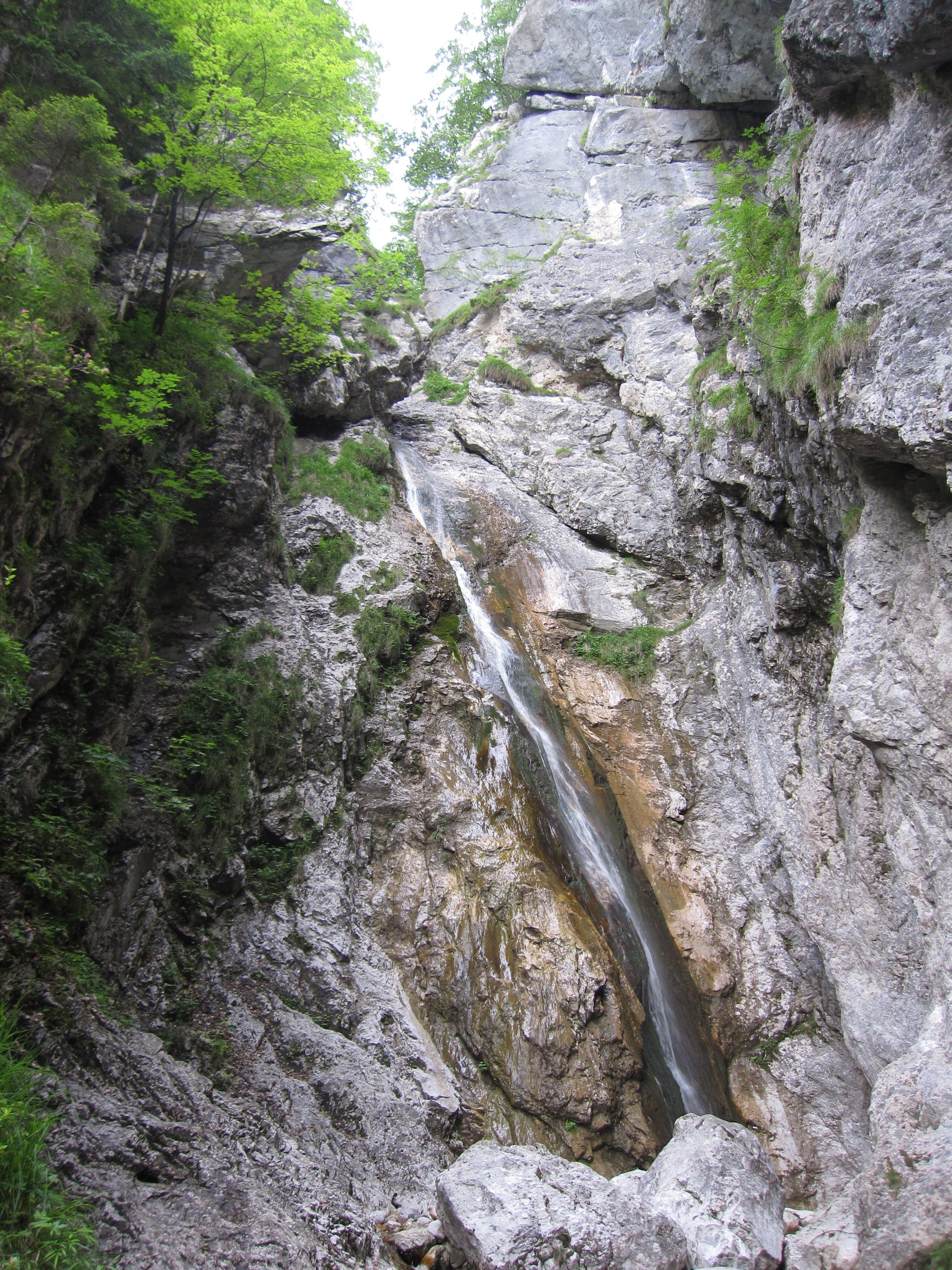 Glavni del slapu Orglice